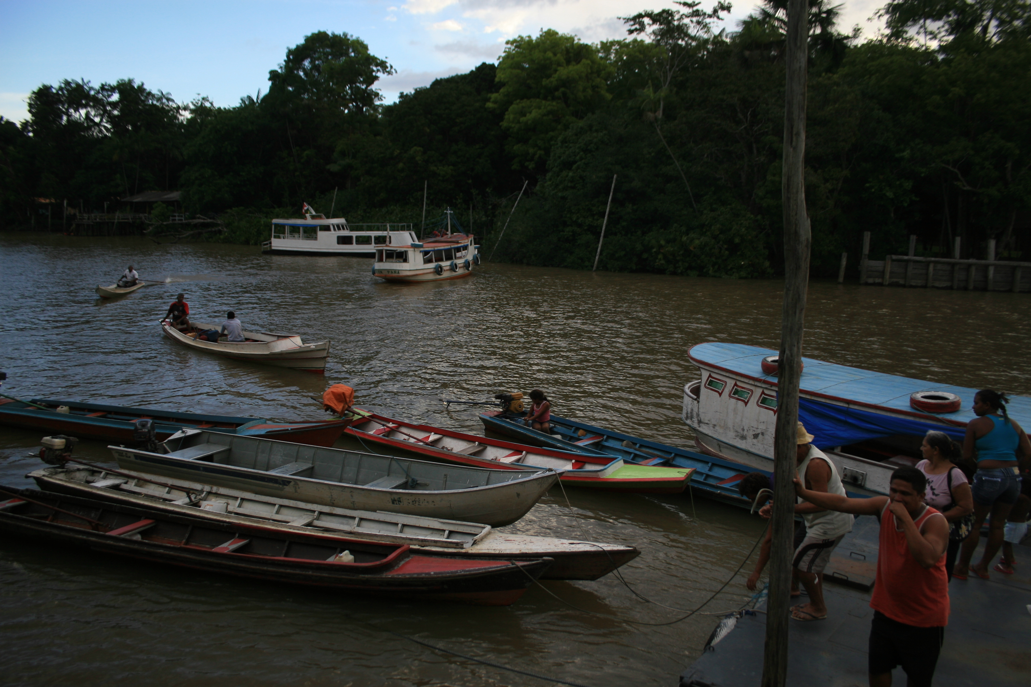 A APA da Ilha do Combu localiza-se na margem esquerda do Rio Guamá, em frente à orla de Belém, com cerca de 1,5 mil hectares. Sua população é de aproximadamente 200 famílias ribeirinhas, que realizam a pesca artesanal e o extrativismo vegetal. Criada através da Lei n 6.083 de 13/11/1997, apresenta fitofisionomia de 100% de Formações Pioneiras, inserida a nordeste do município de Belém, PA. (Fonte ISA)